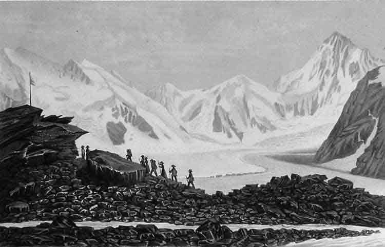 "Hôtel des Neuchâtelois" sur la mer de glace du Lauteraar et Finsteraar. Côté septentrional. - C'était ainsi qu'était nommé un bloc sur la moraine où l'équipe de Louis Agassiz séjournèrent lors de leur expédition scientifique sur le glacier de l'Unteraar en Suisse.